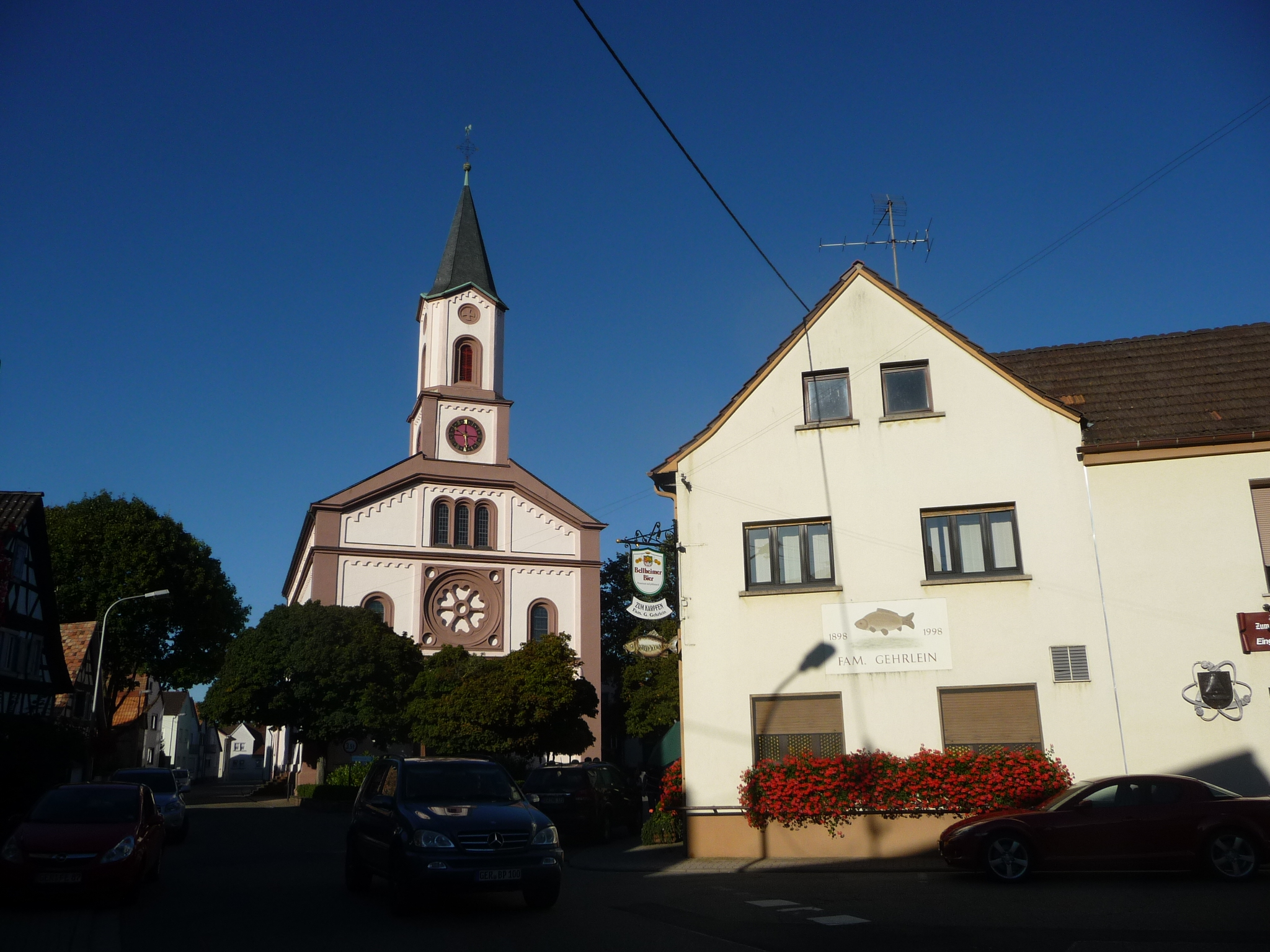 Neupotz im Landkreis Germersheim, südliches Rheinland-Pfalz